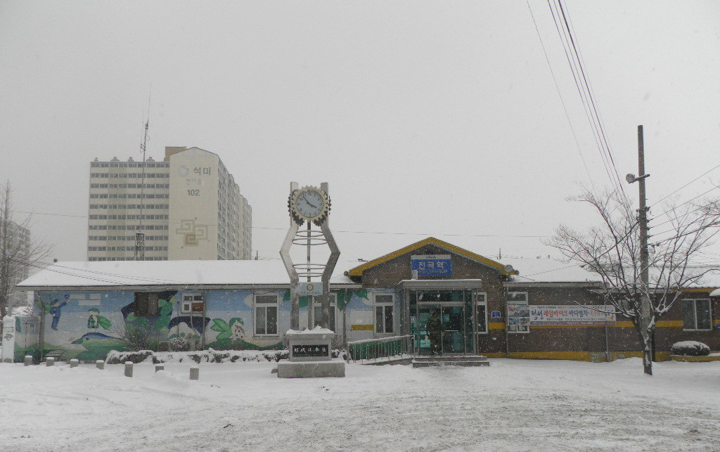 경원선 전곡역